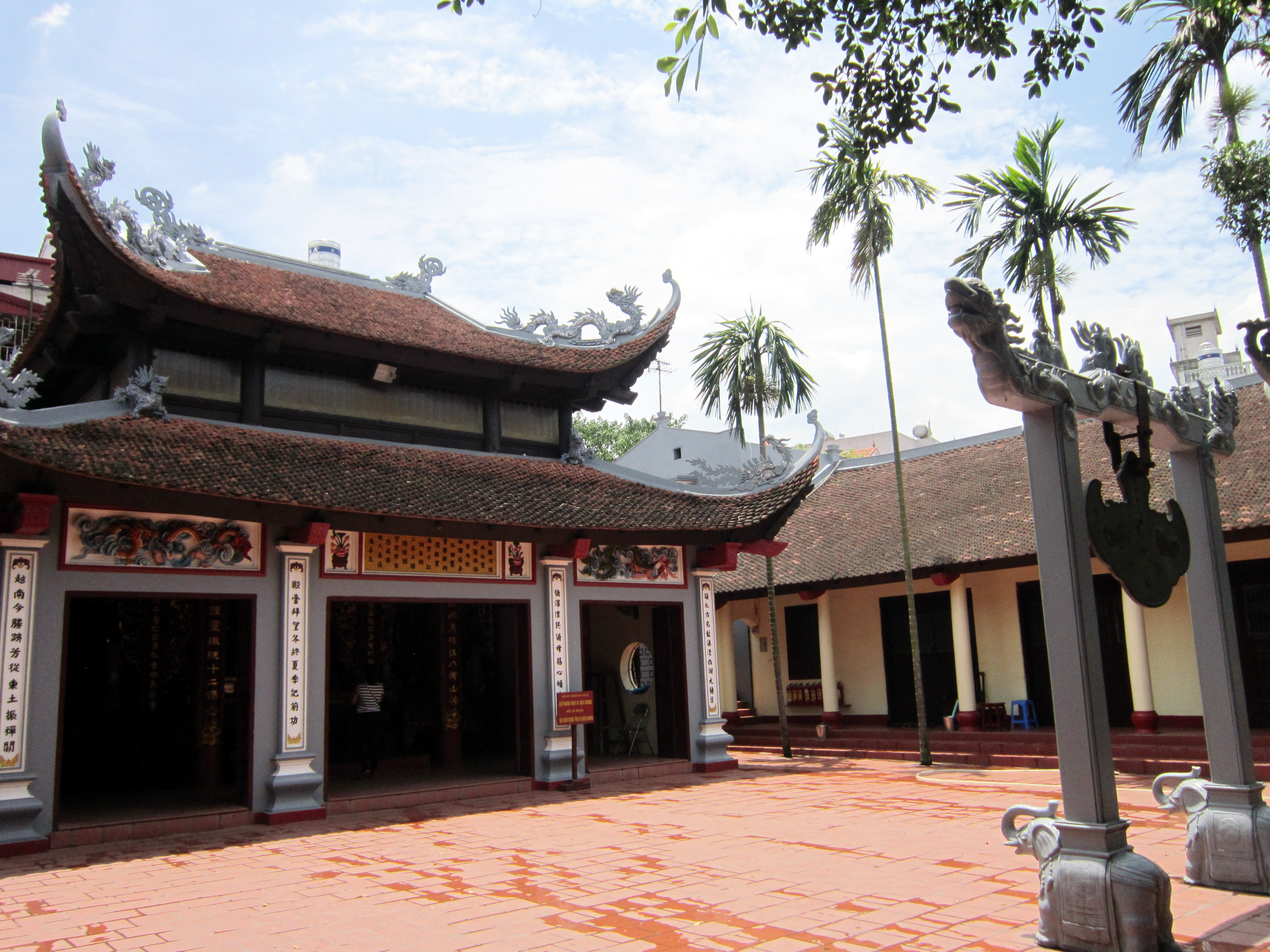 Phủ Tây Hồ nằm trên bán đảo lớn giữa hồ Tây; nay thuộc phường Quảng An, quận Tây Hồ, thành phố Hà Nội, Việt Nam. Phủ thờ Liễu Hạnh Công chúa, một nhân vật trong truyền thuyết, và là một trong bốn vị thánh bất tử trong tín ngưỡng của người Việt.